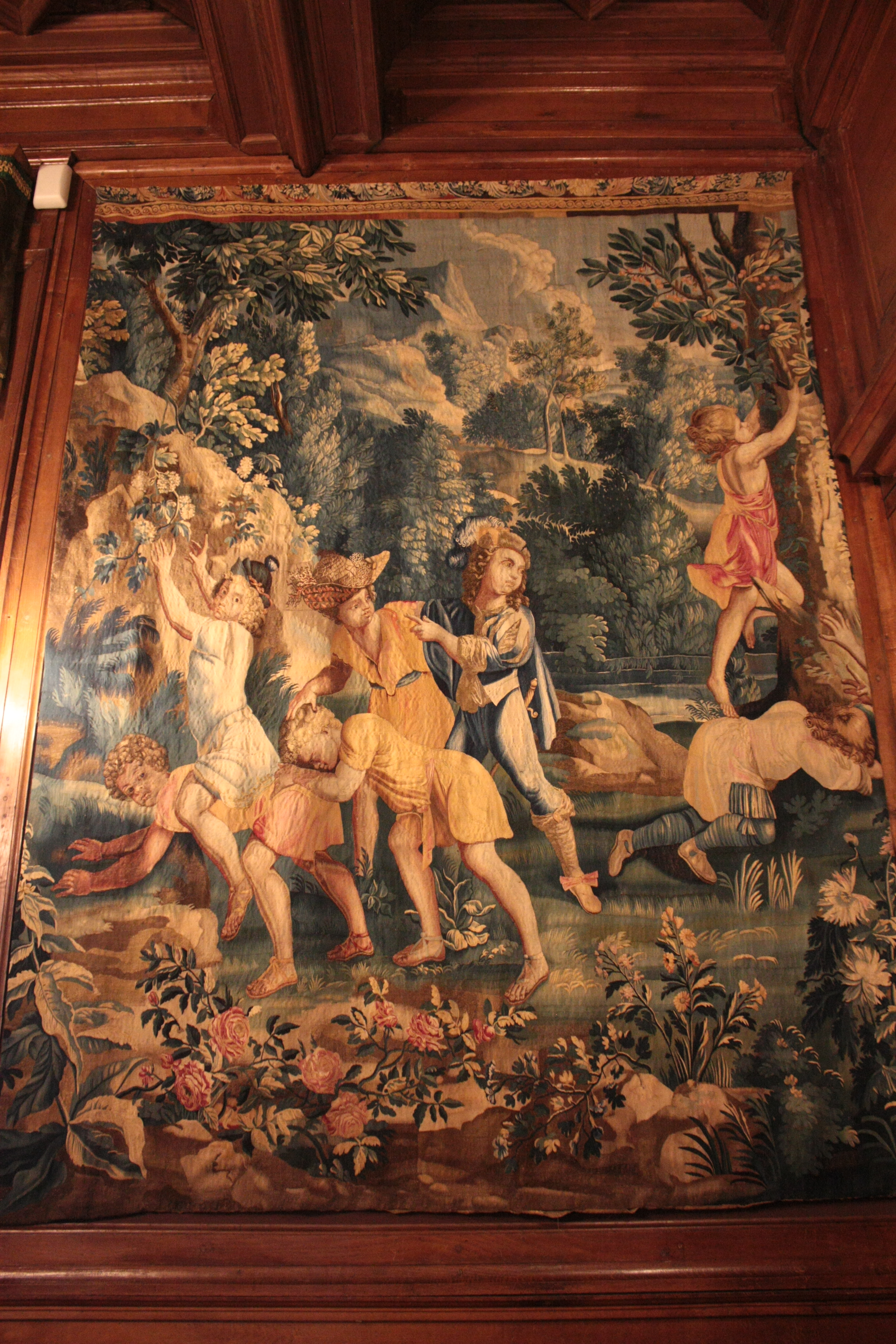 Jeux d'enfants : Cheval fondu, Tapisserie des Gobelins, 2e moitié 17e siècle